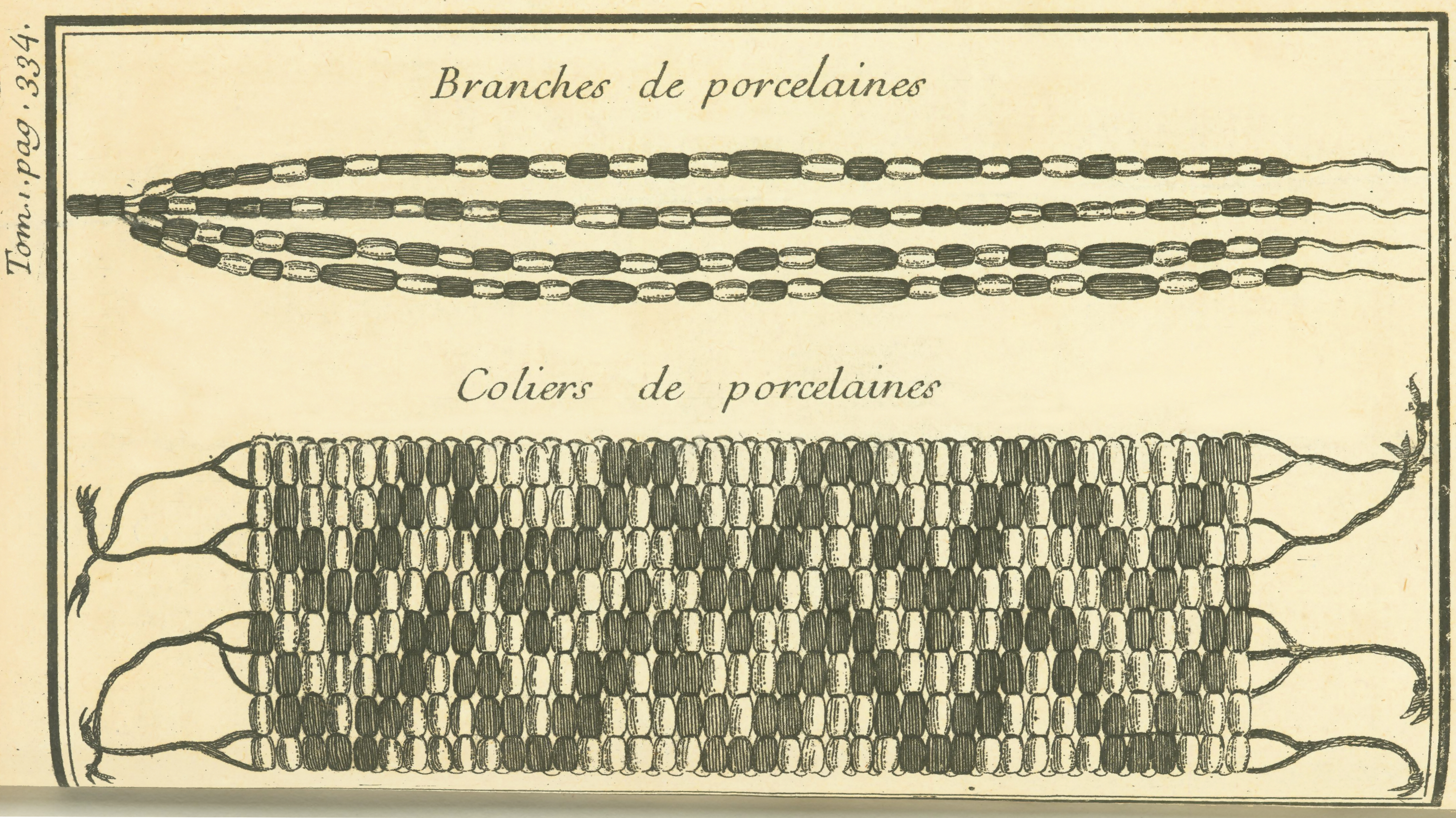 Colliers de porcelaine (illustration publiée par La Potherie dans Histoire de l'Amerique Septentrionale, tome premier, 1722)